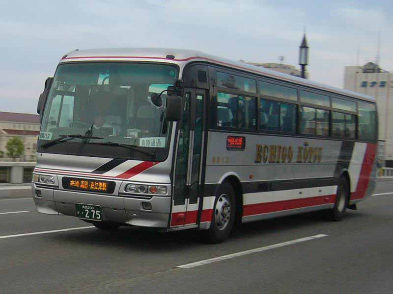 越後交通所属のバス。登録番号 長岡200か・275。新潟～高田・直江津線用。万代橋にて撮影。